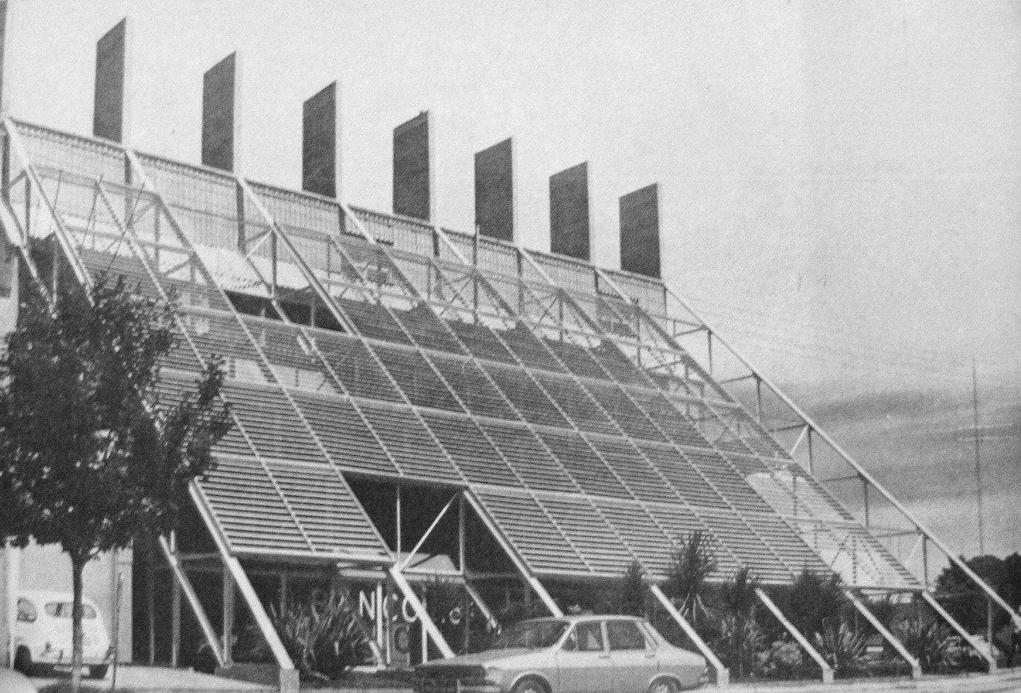 Fachada de la sucursal Río Tercero del Banco de la Provincia de Córdoba. Obra del arquitecto Miguel Ángel Roca, 1973-1977.